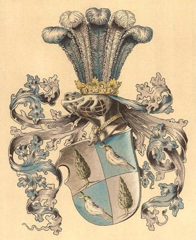 Het Russische wapen van het geslacht Von Balluseck